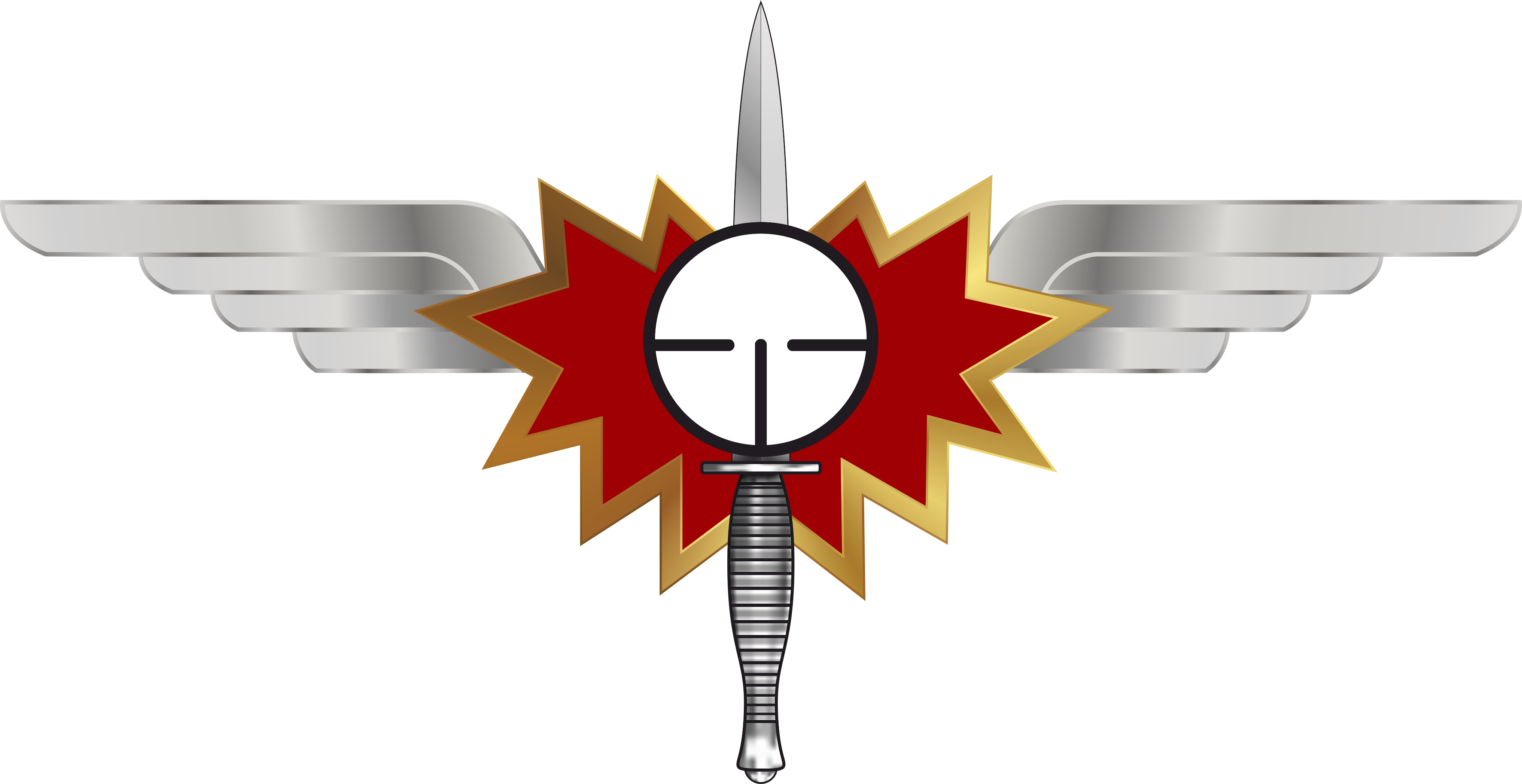 Emblema do Curso de Operações Especiais